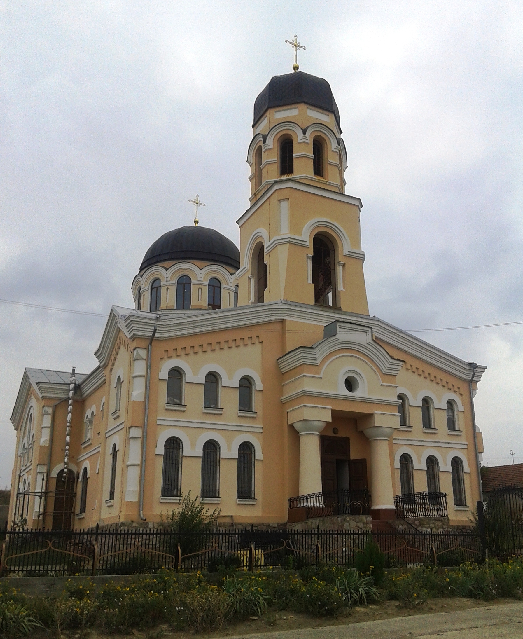 Вікіекспедиція у Буджак